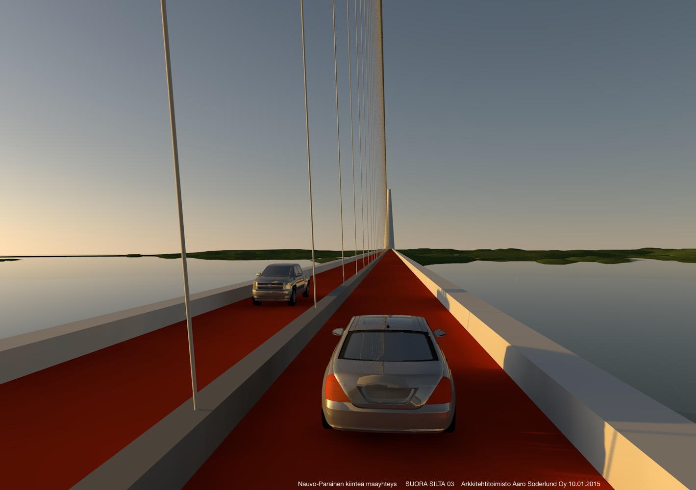 Kolmipyloninen epäsymmetrinen vinoköysisilta (pituus 1600 m) nykyiselle Nauvo-Parainen maantielauttavälille sijoitettuna (konsepti); Saaristotienäkymä sillan päältä.